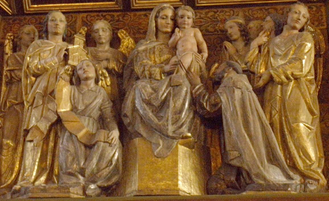 Iglesia de Nuestra Señora del Carmen (Oviedo)